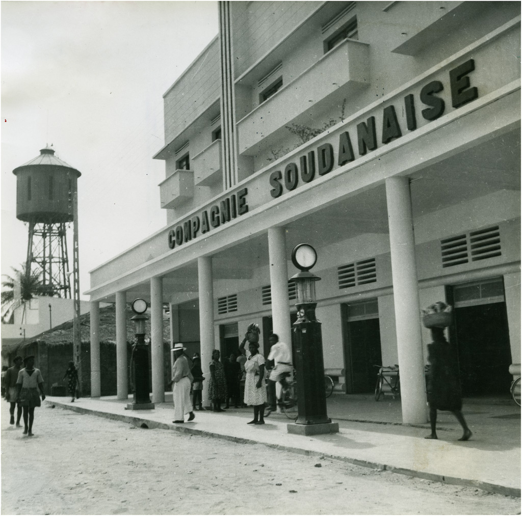 Compagnie Soudanaise